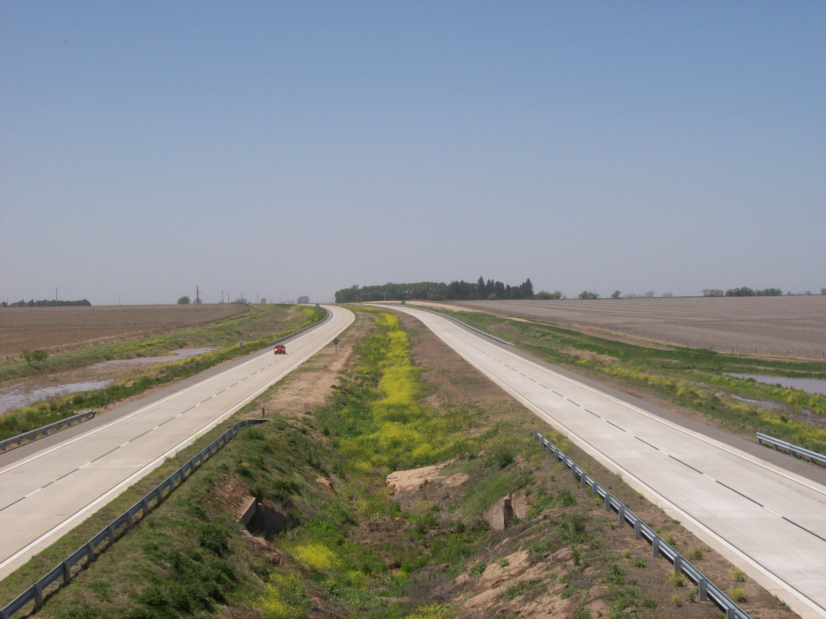 Autopista Rosario-Córdoba en el km 365 hacia el Oeste, al sur de la ciudad de Cañada de Gómez en la Provincia de Santa Fe, Argentina.